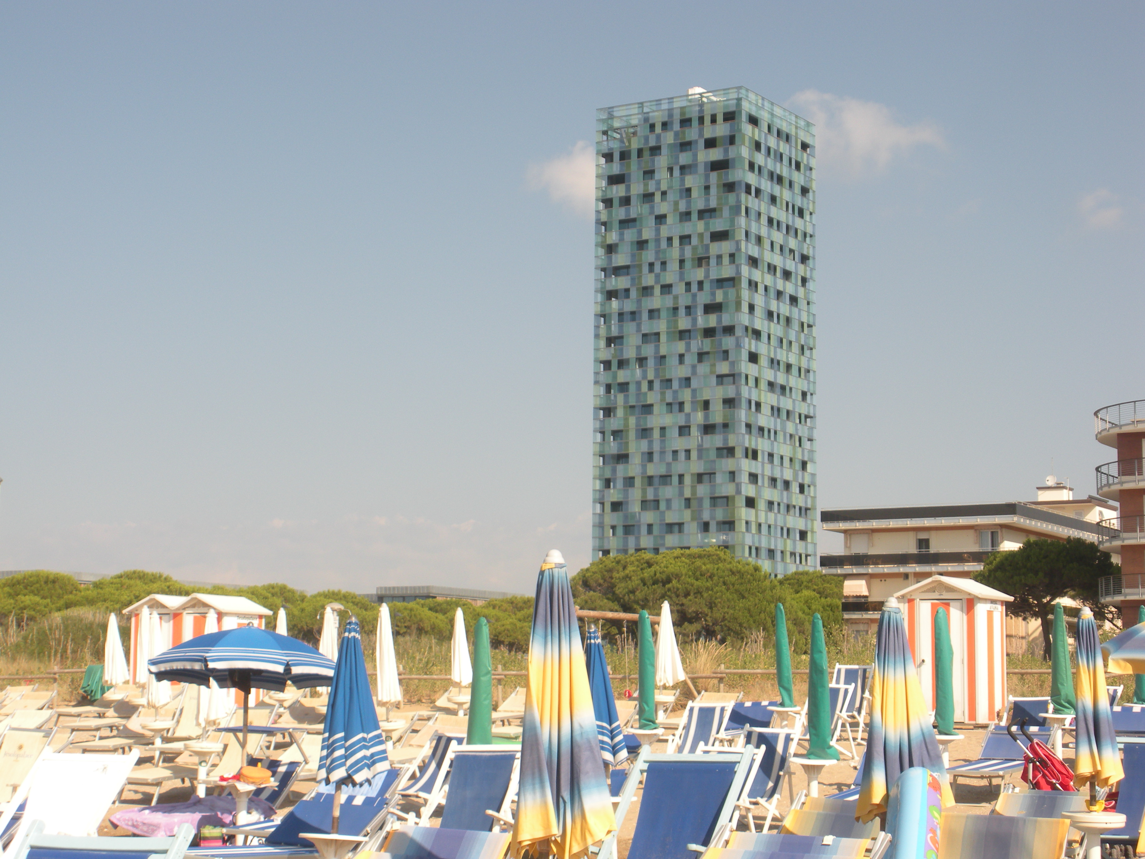 grattacielo Merville